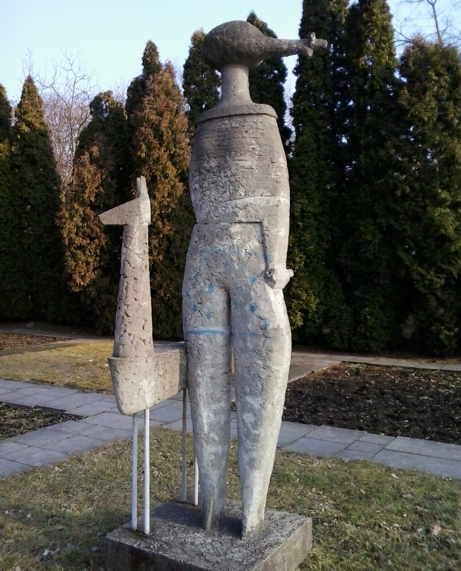 Rzeźba Niedziela w Parku Cytadela w Poznaniu. Autor: Roman Tarkowski.